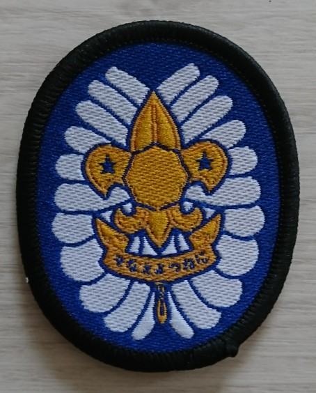 菊章